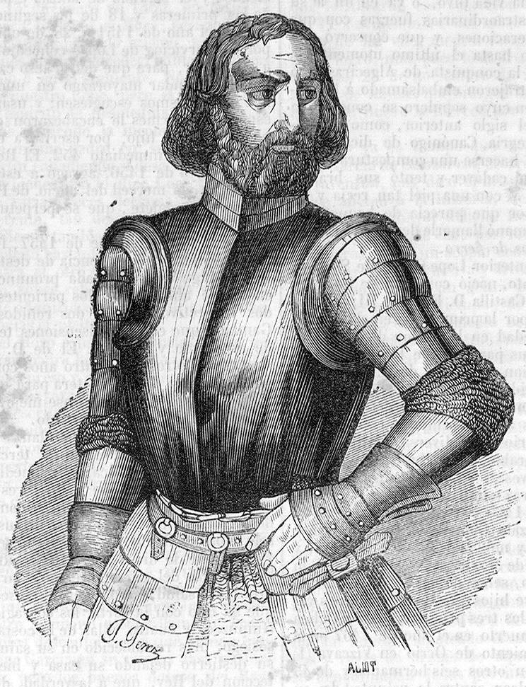 Biografía española. Lope García de Salazar.